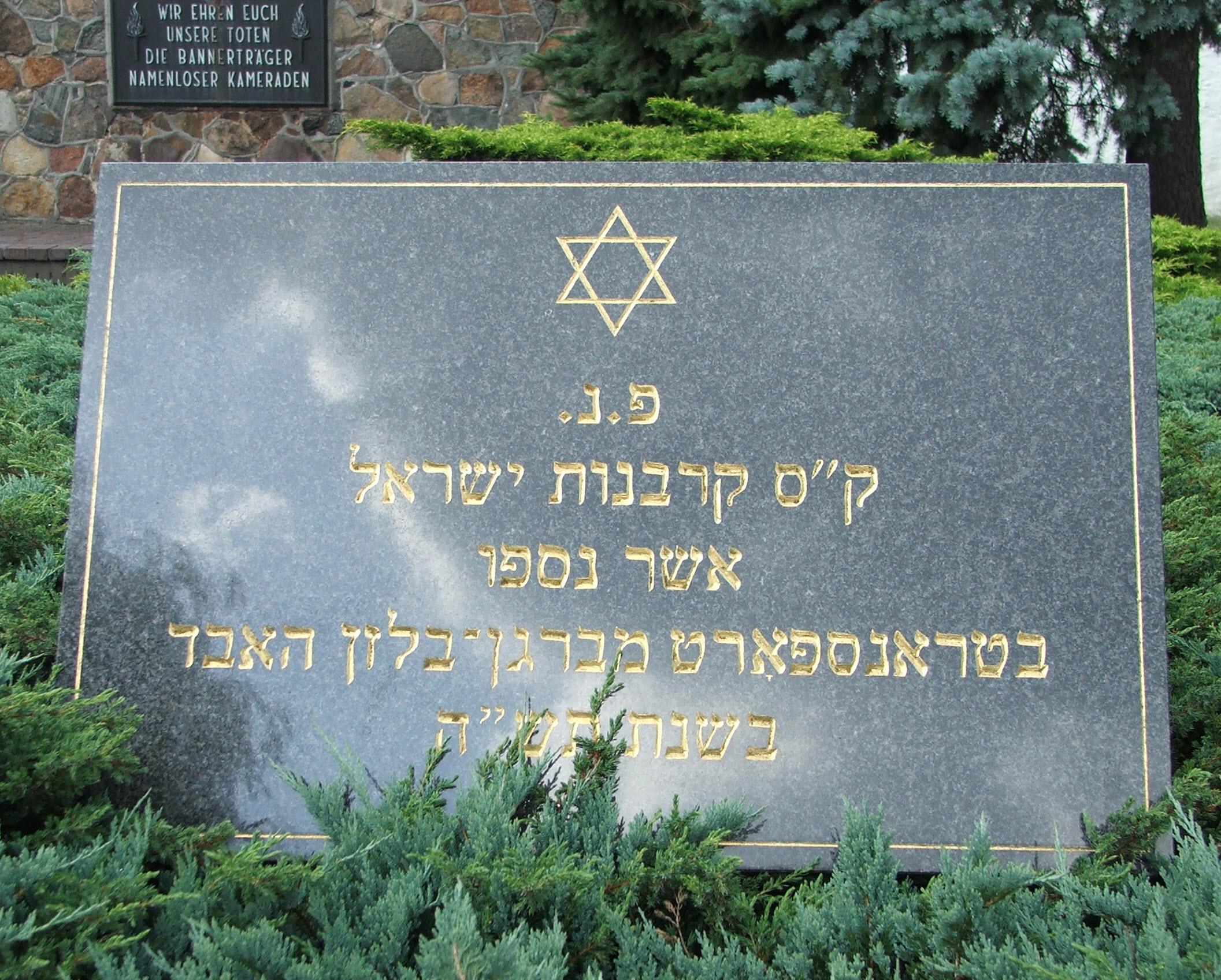 Teil des Denkmales in Tröbitz, hebräische Platte